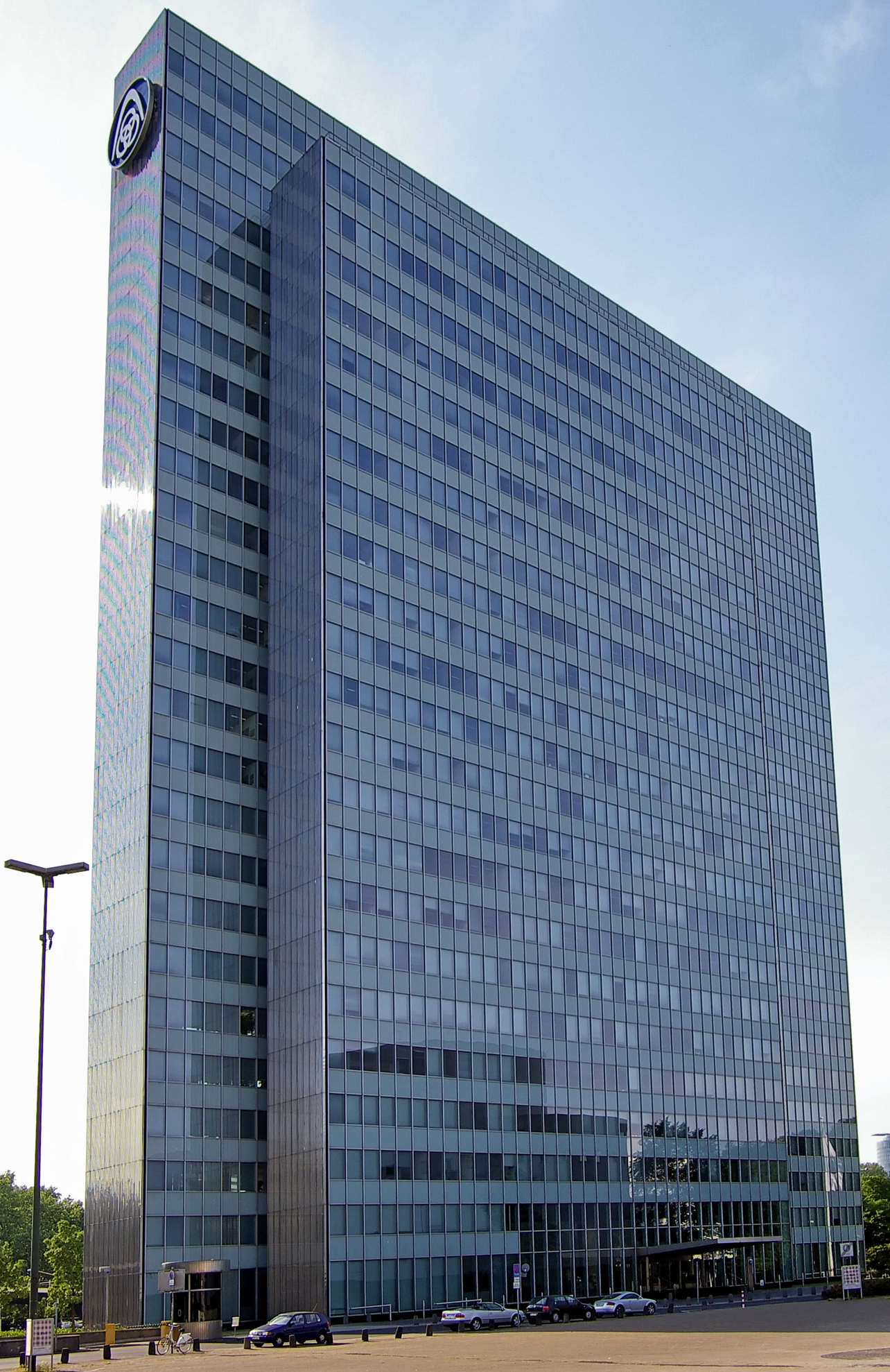 Thyssen-Haus in Düsseldorf, Sicht vom Schauspielhaus/Gründgensplatz aus.